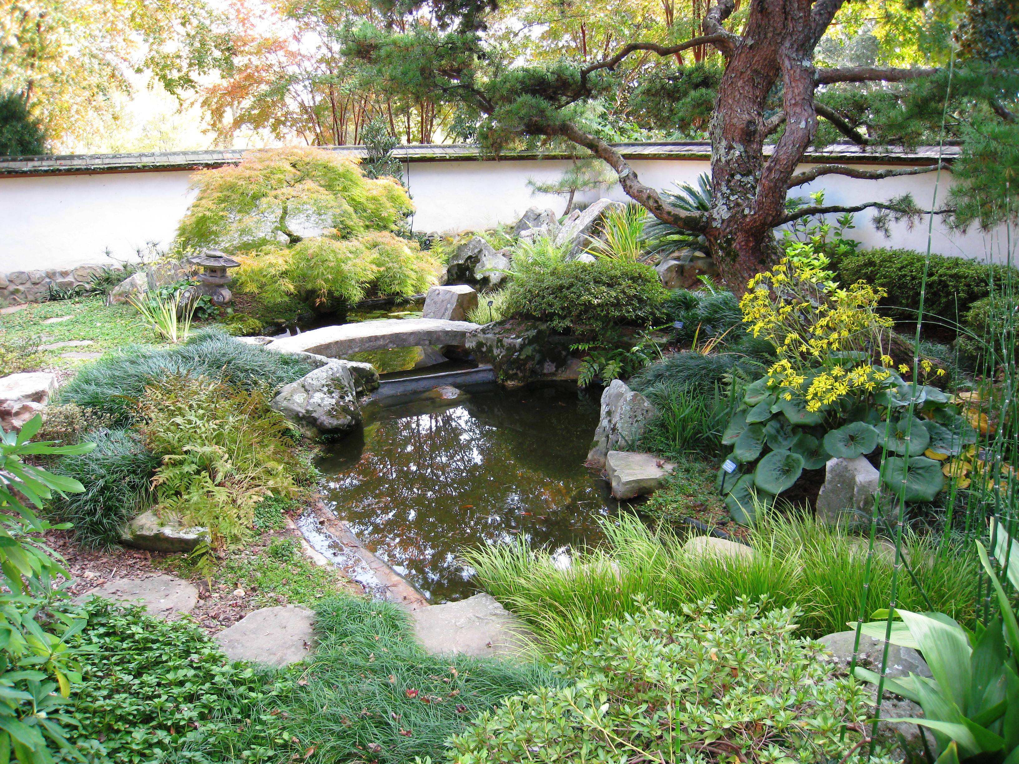 Japanese garden, Atlanta Botanical Garden, Atlanta, Georgia, USA.